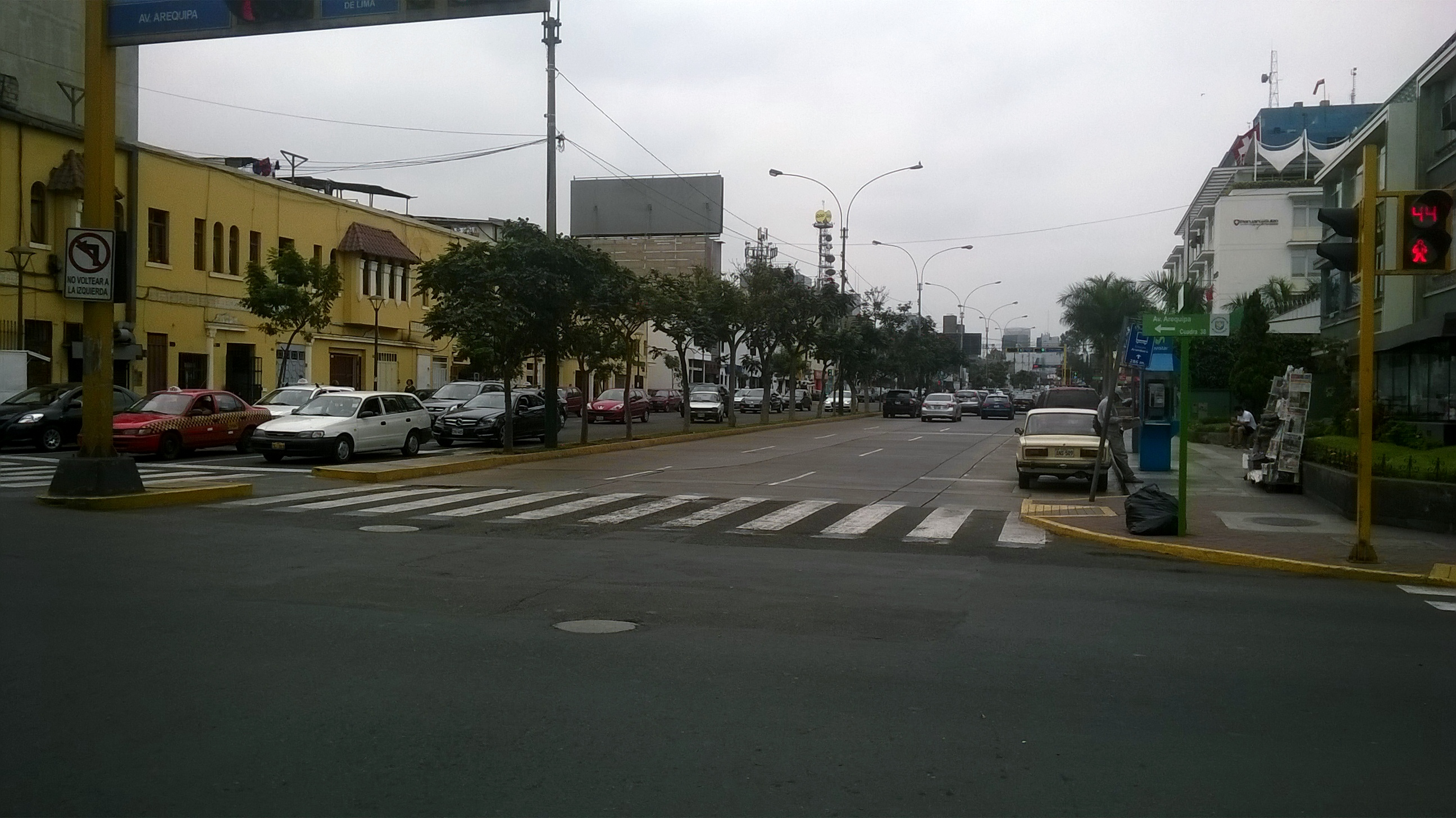 La avenida Aramburú en Lima.